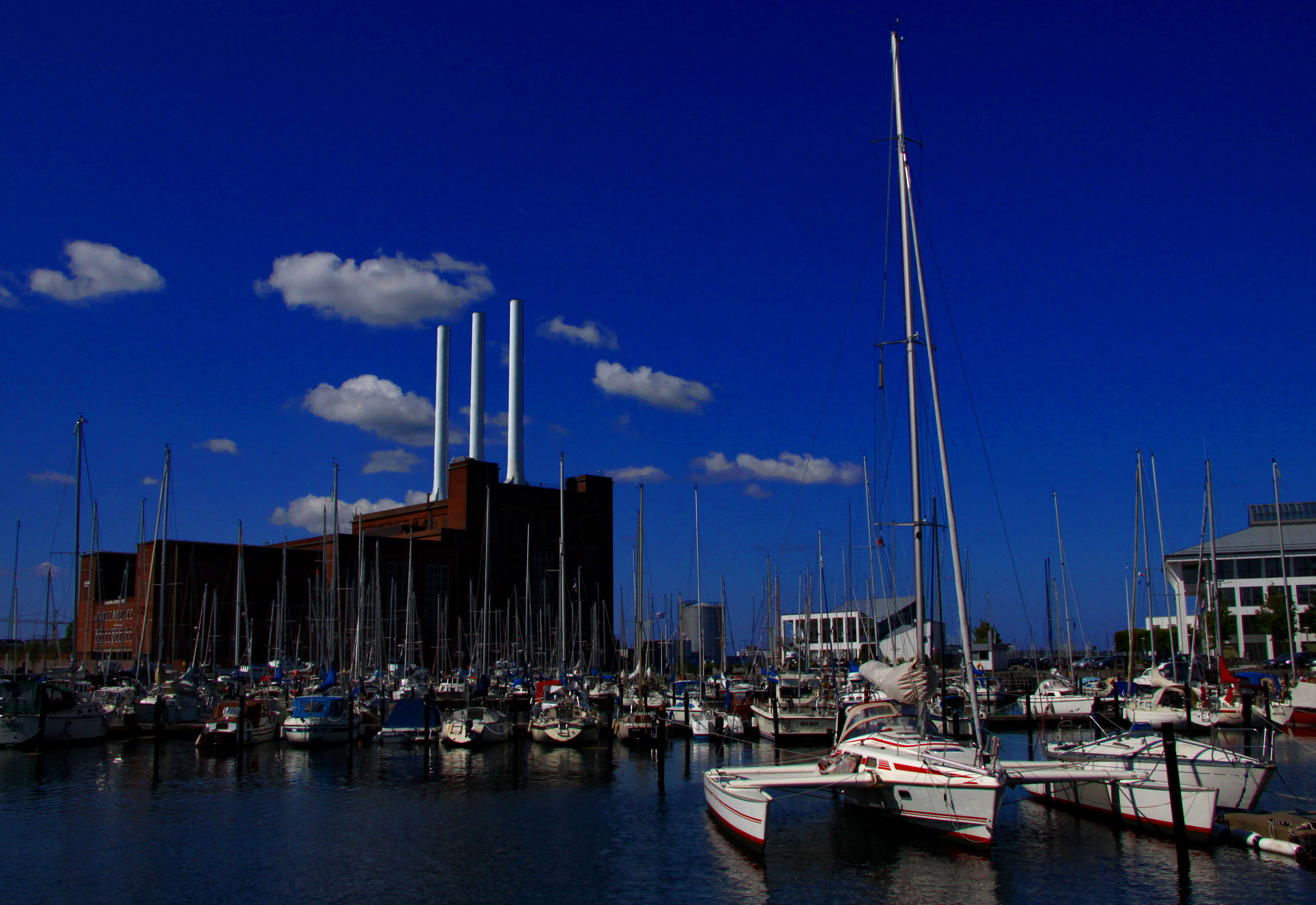 København / Copenhagen. I Kalbrænderihavnen.